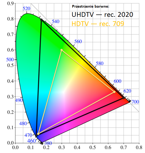 Różnice przestrzeni barwnych standardu: UHDTV i HDTV